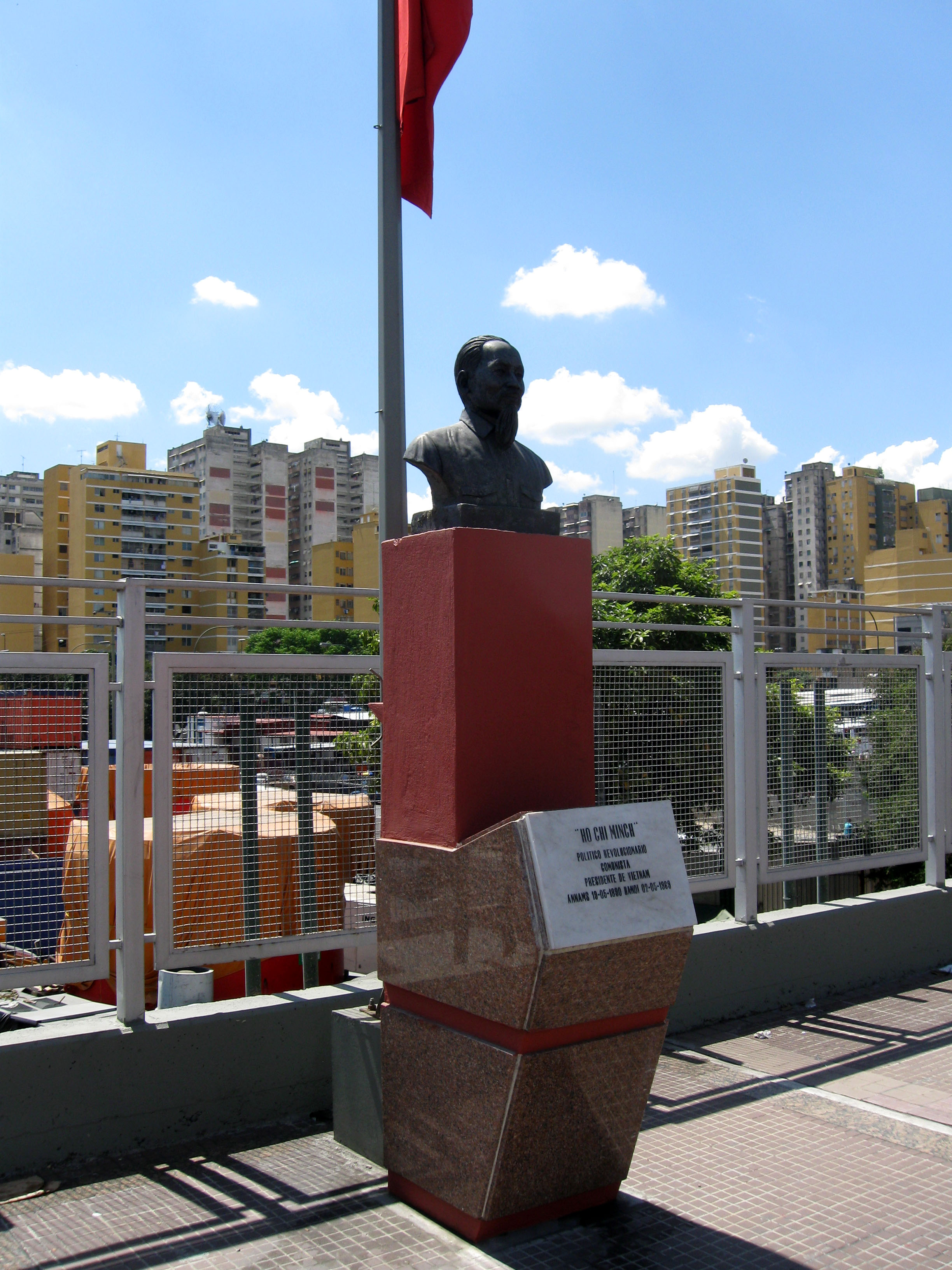 Ho Chi Minh